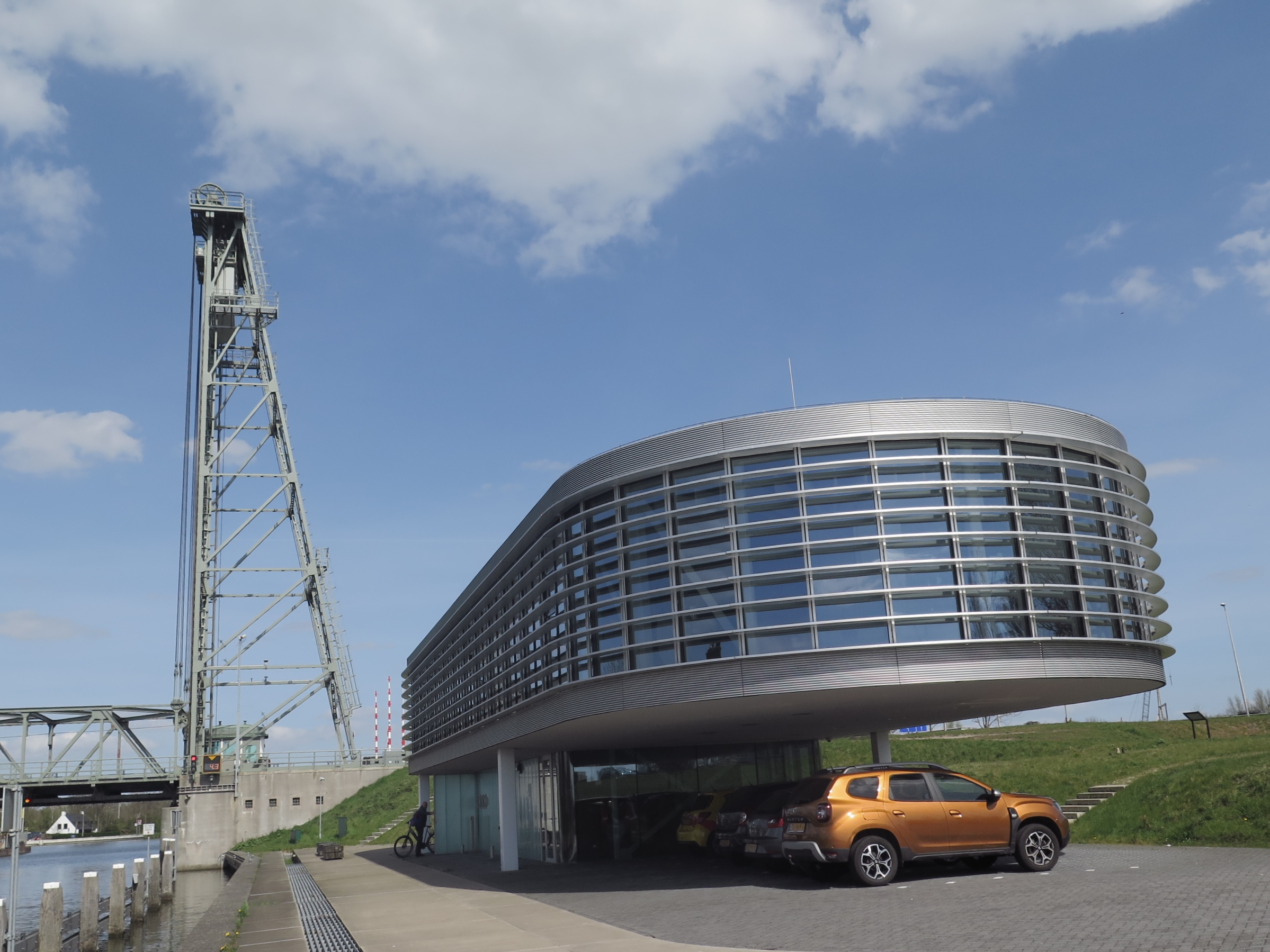 Brugbedieningscentrum Steekterpoort, waar bruggen op afstand worden bediend